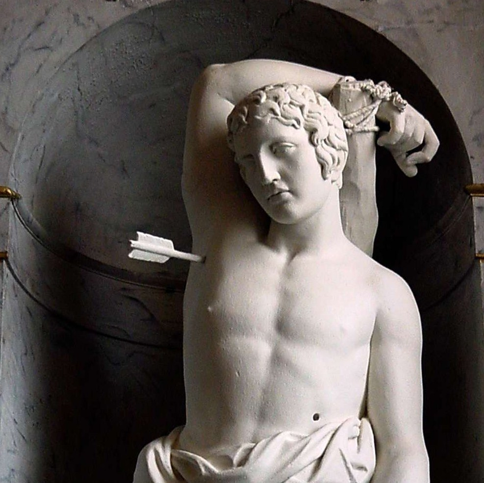 Statue de St Sébastien - Eglise de Fresnay en Retz - France